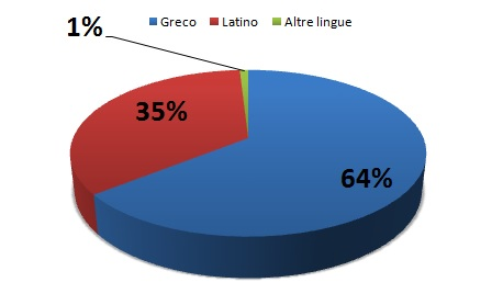 Composizione etimologica del dialetto tarantino secondo G. Rohlfs